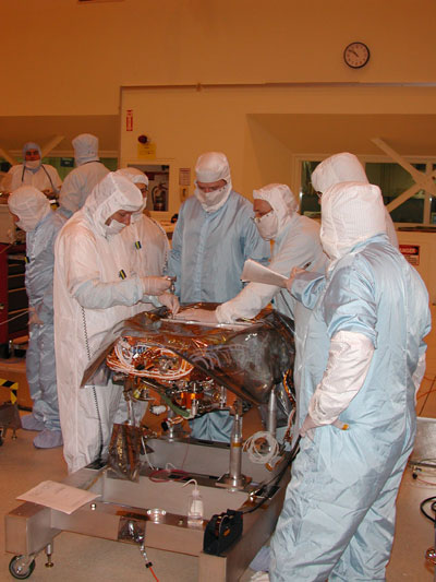 Группа инженеров и техников работает над основным «Тёплом Блоке»(WEB), в котором размещена электроника марсохода Оппортьюнити.